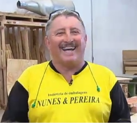 Futebolista